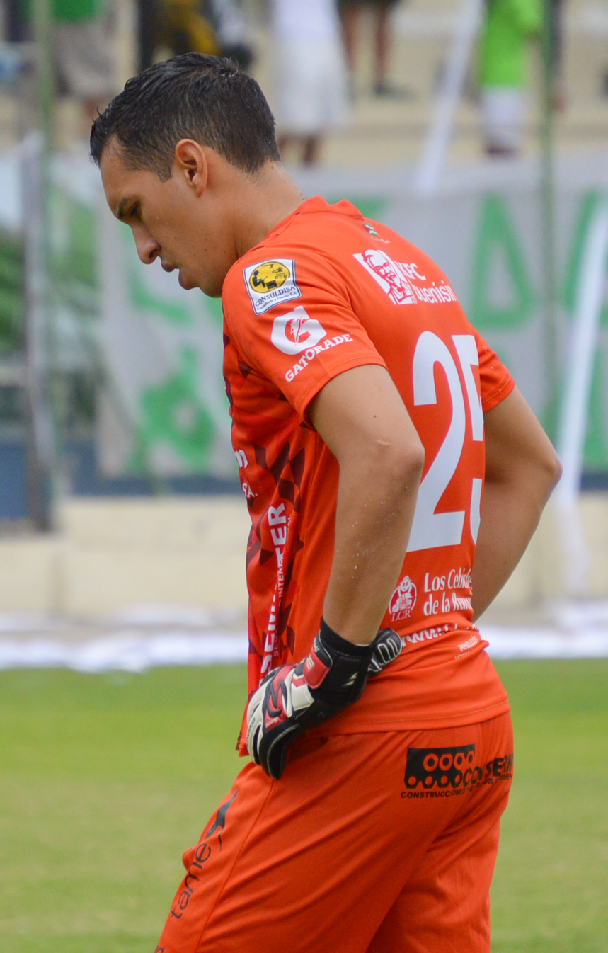 Francisco Mendoza en Liga de Portoviejo - 2014